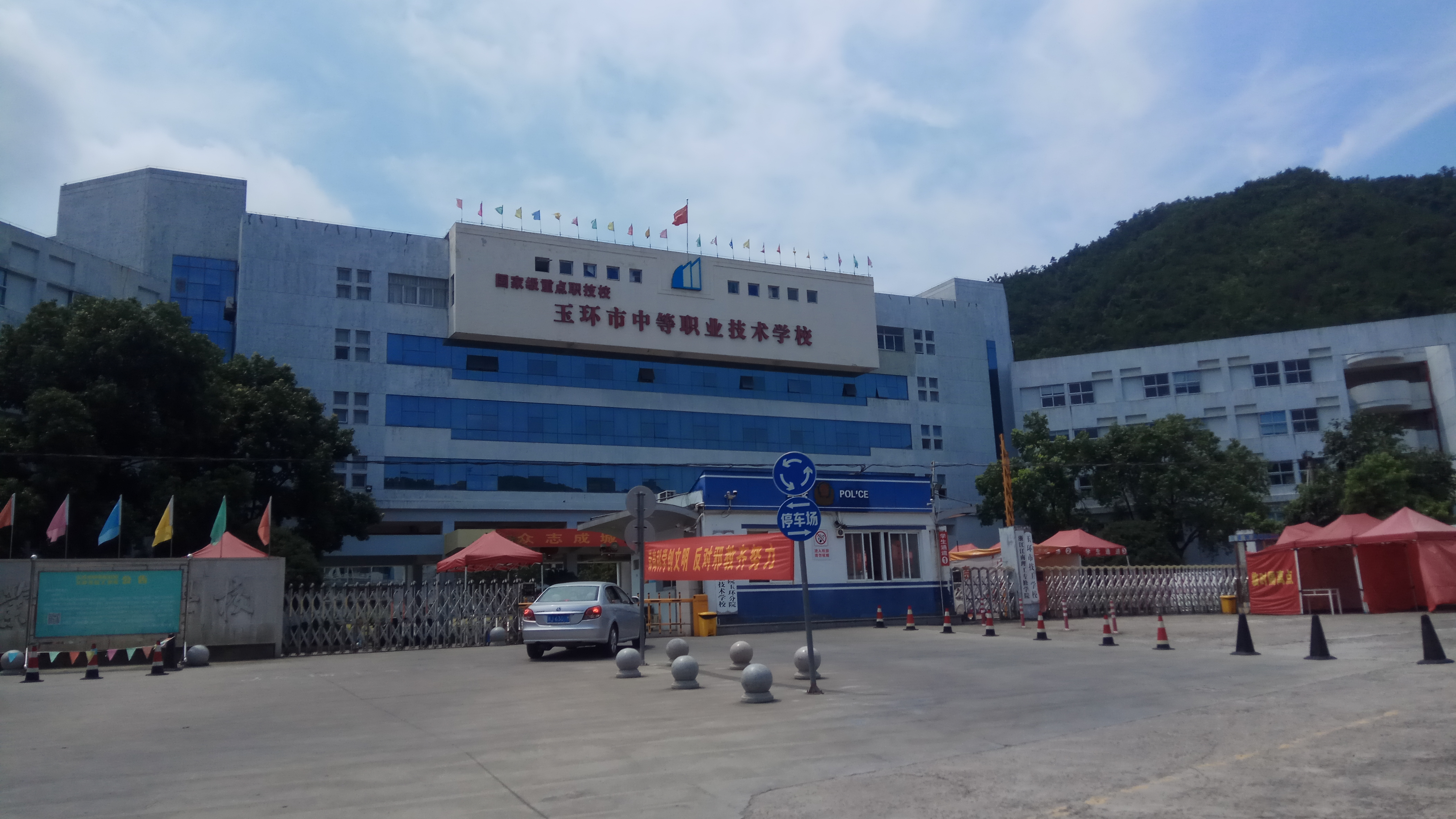 中文（中国大陆）: 玉环市中等职业技术学校